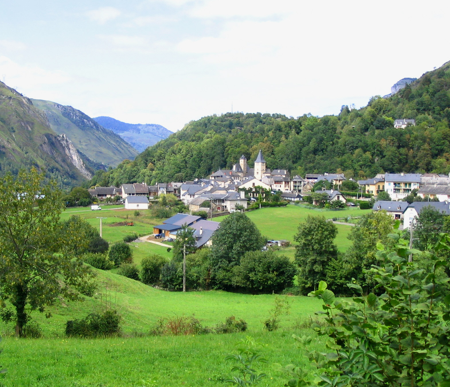 Village de béost, Pyrénées Atlantiques, France Village of Béost in the French Pyreneas Auteur/author: P Charpiat - 2006